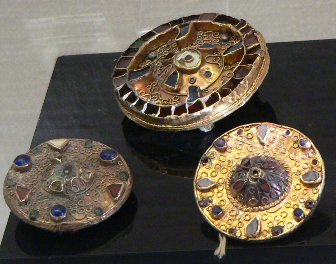 Fibules Fibules mérovingiennes